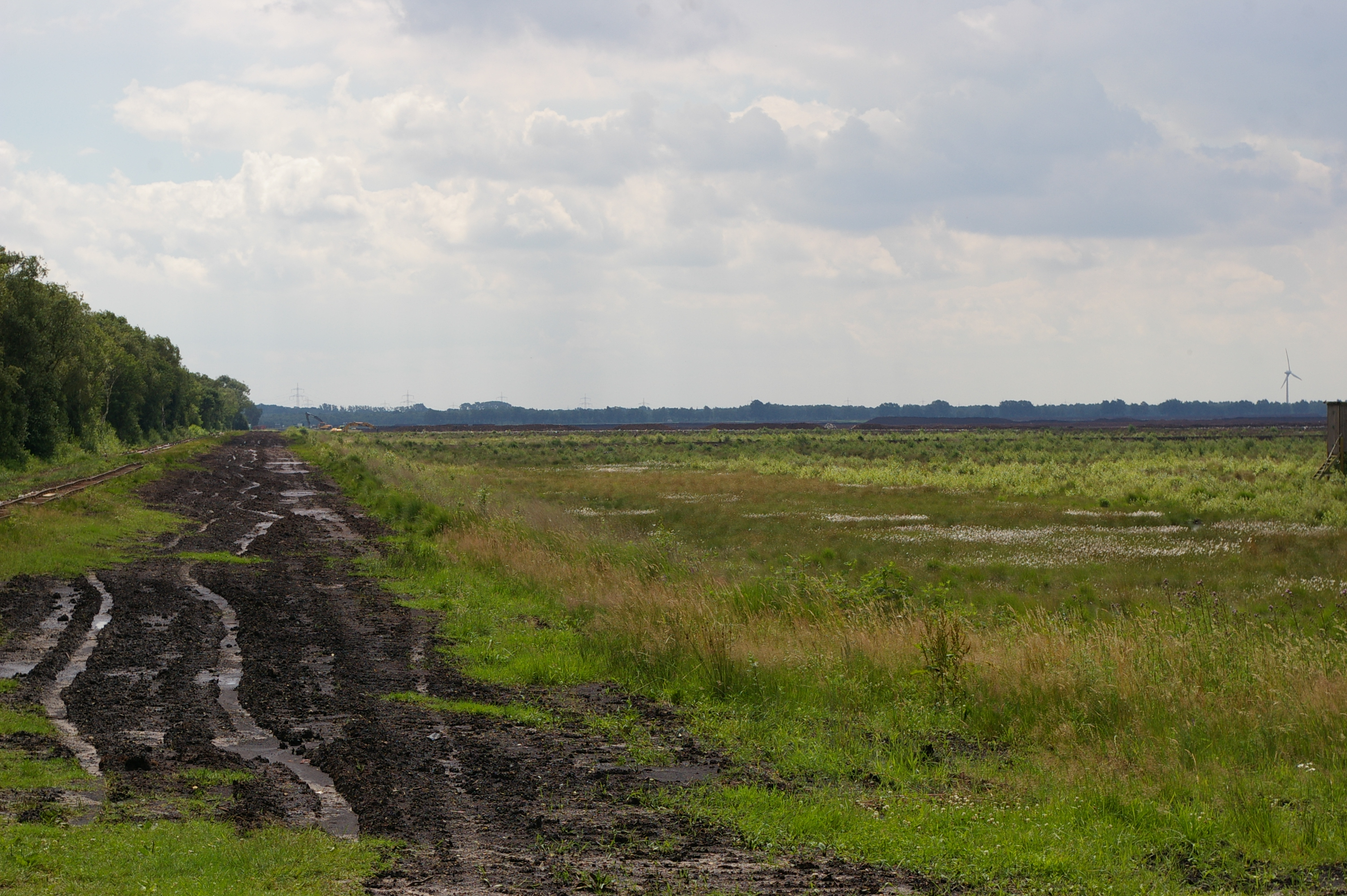 Das Borsteler Moor südlich von Borstel